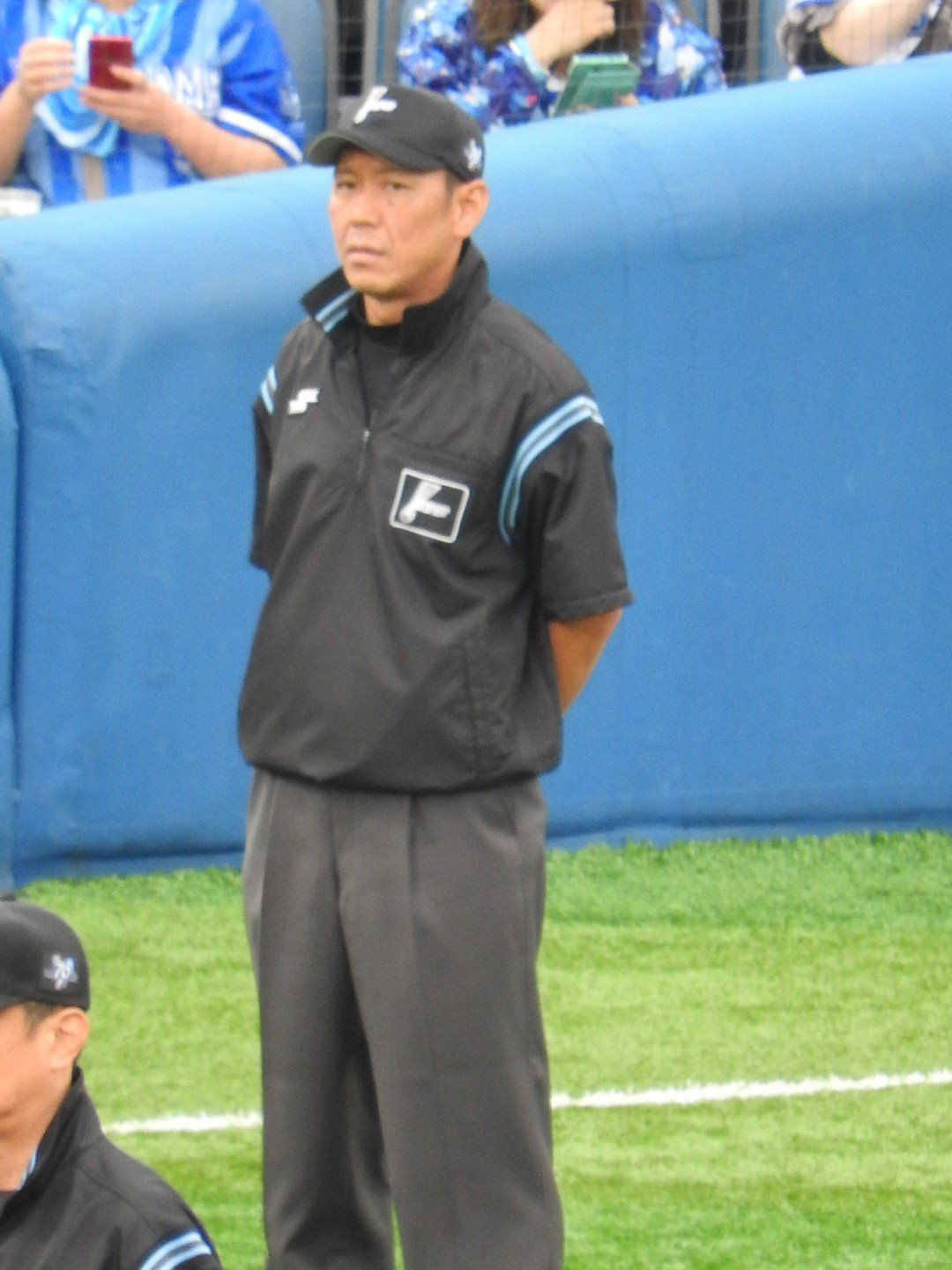 2019年10月6日横浜スタジアムにて